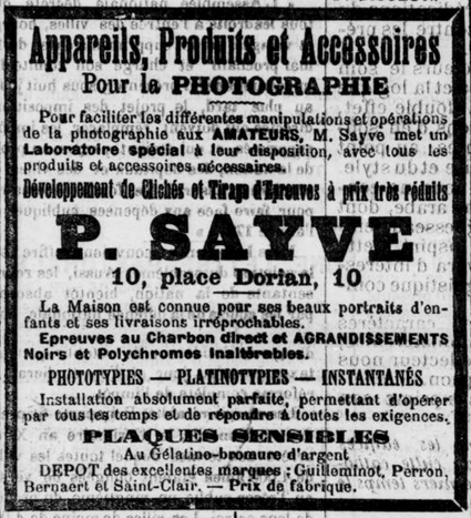 Publicité entièrement textuelle.